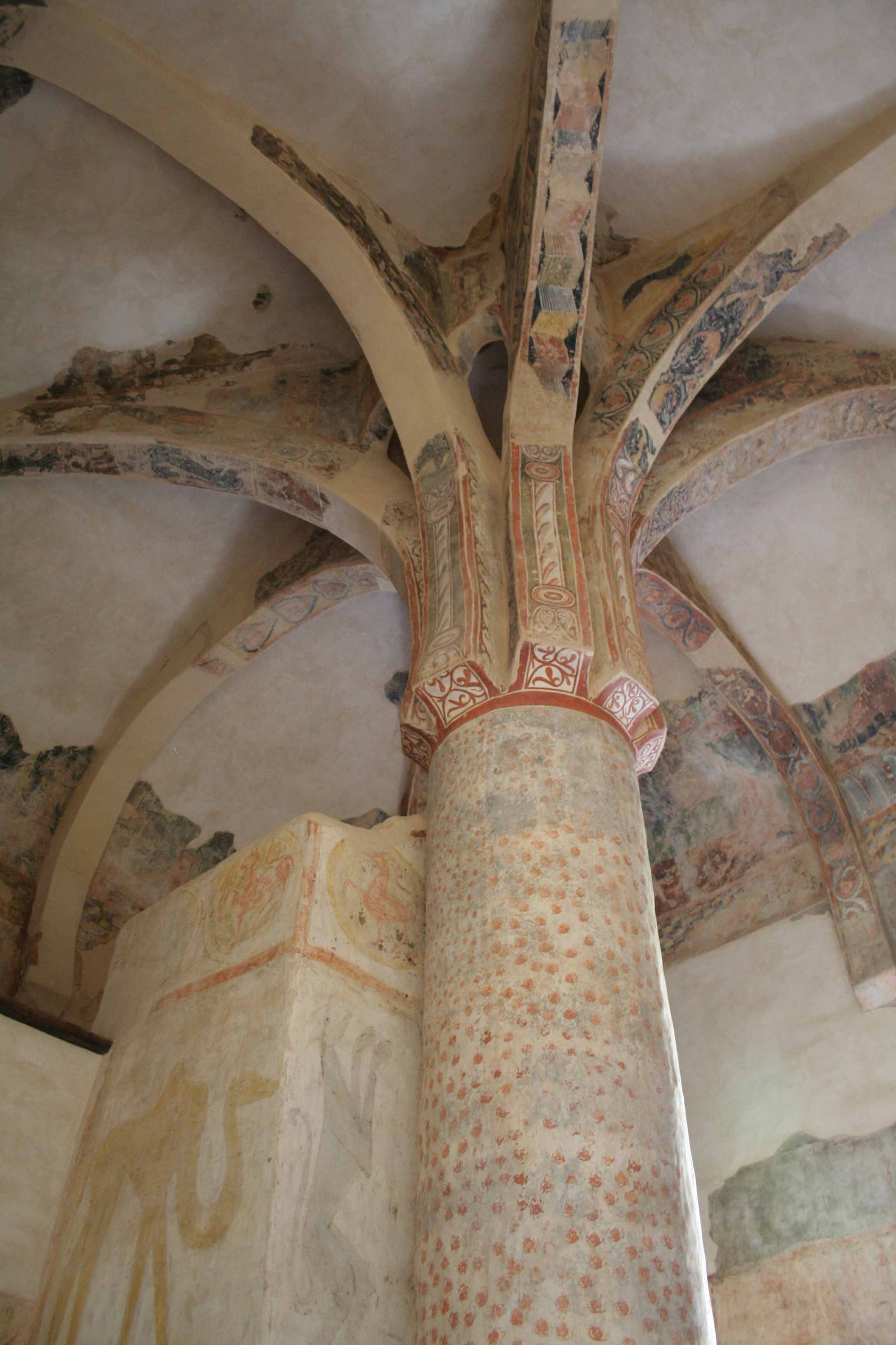 Pilar central de la ermita de San Baudelio de Berlanga, Caltojar, Soria